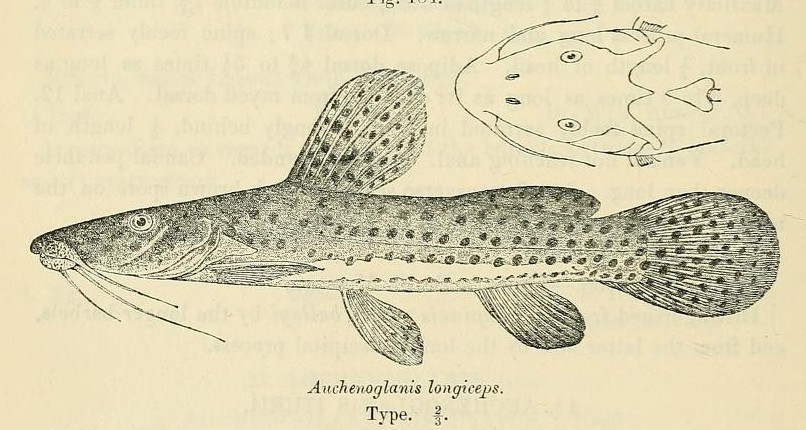 Parauchenoglanis longiceps syn. Auchenoglanis longiceps